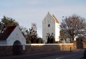 Odder kirke